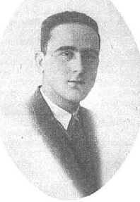 Fotografía del crítico cinematográfico Luis Gómez Mesa publicada en 1926, cuando formaba parte de la plantilla de la revista Popular Film.